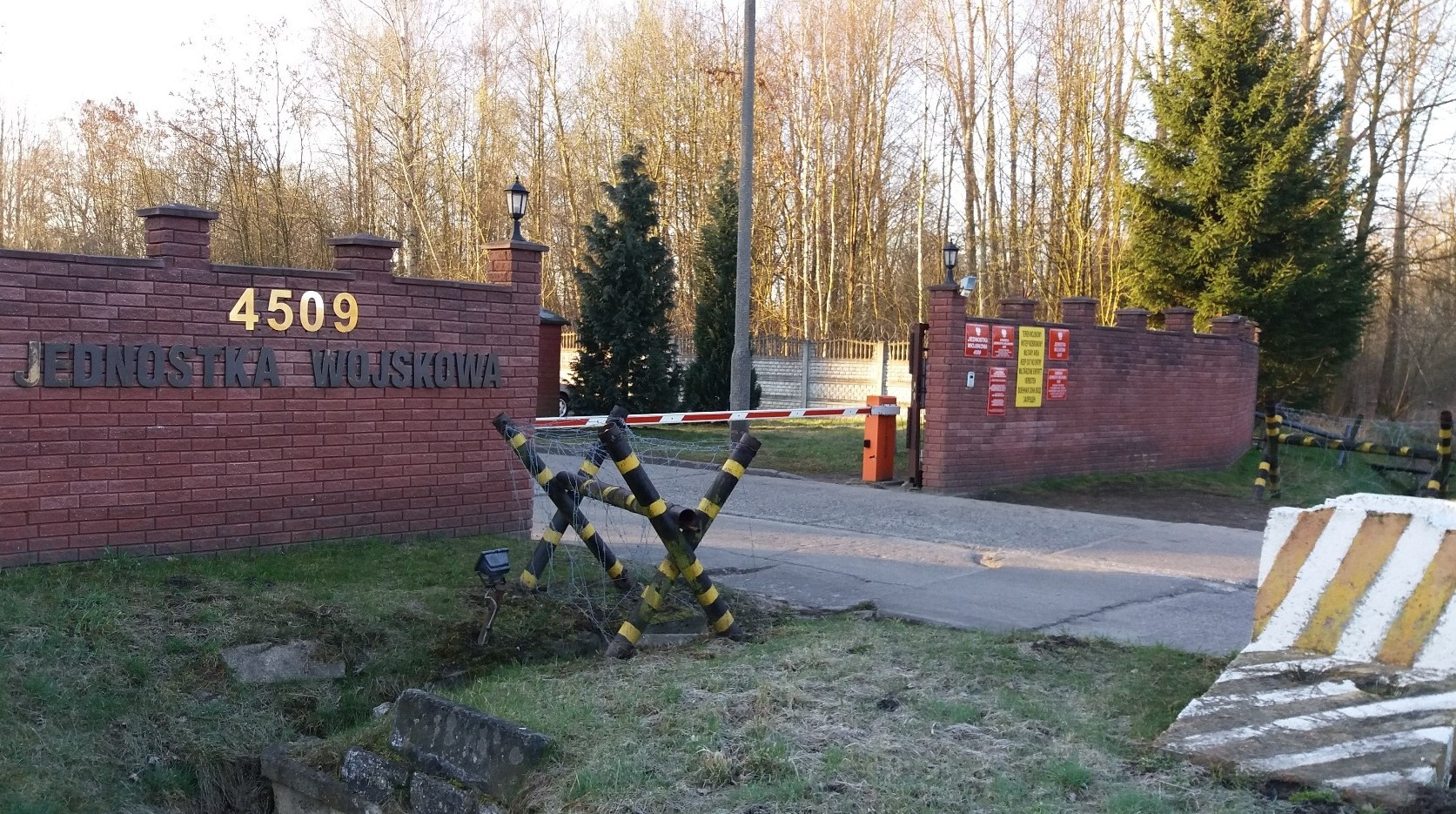 Bielkowo. 102 Batalion Ochrony